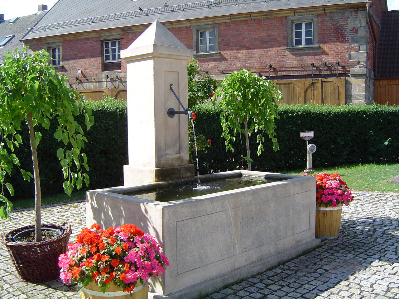 Mistelbach (Oberfranken) - Brunnen in der Dorfmitte